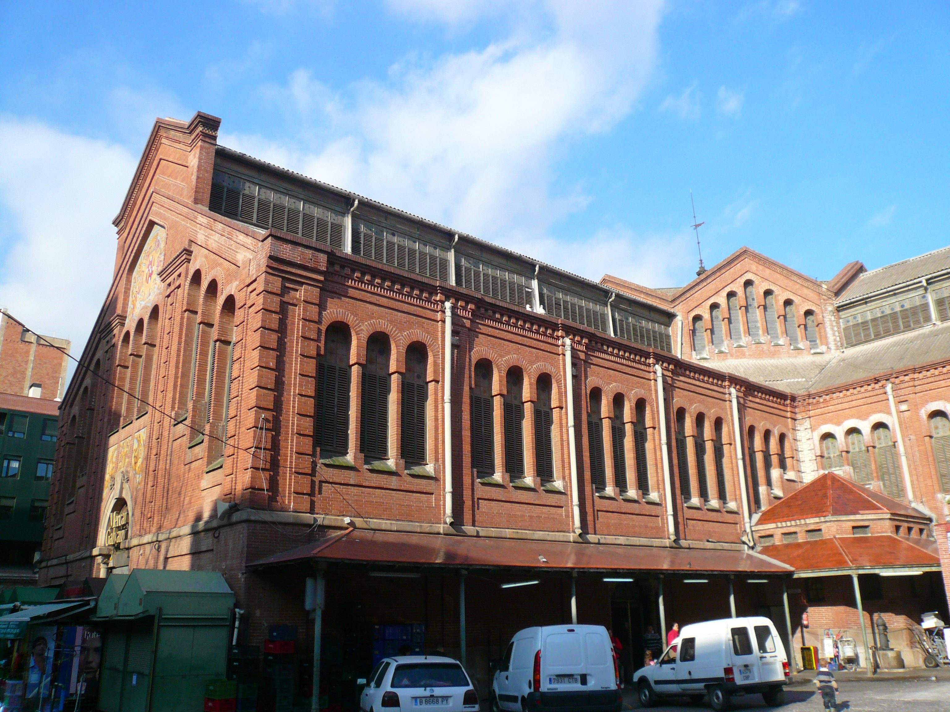 Mercat de Galvany, Barcelona